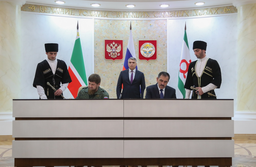 Александр Матовников приветствовал подписание соглашения о границе между Республикой Ингушетия и Чеченской Республикой.